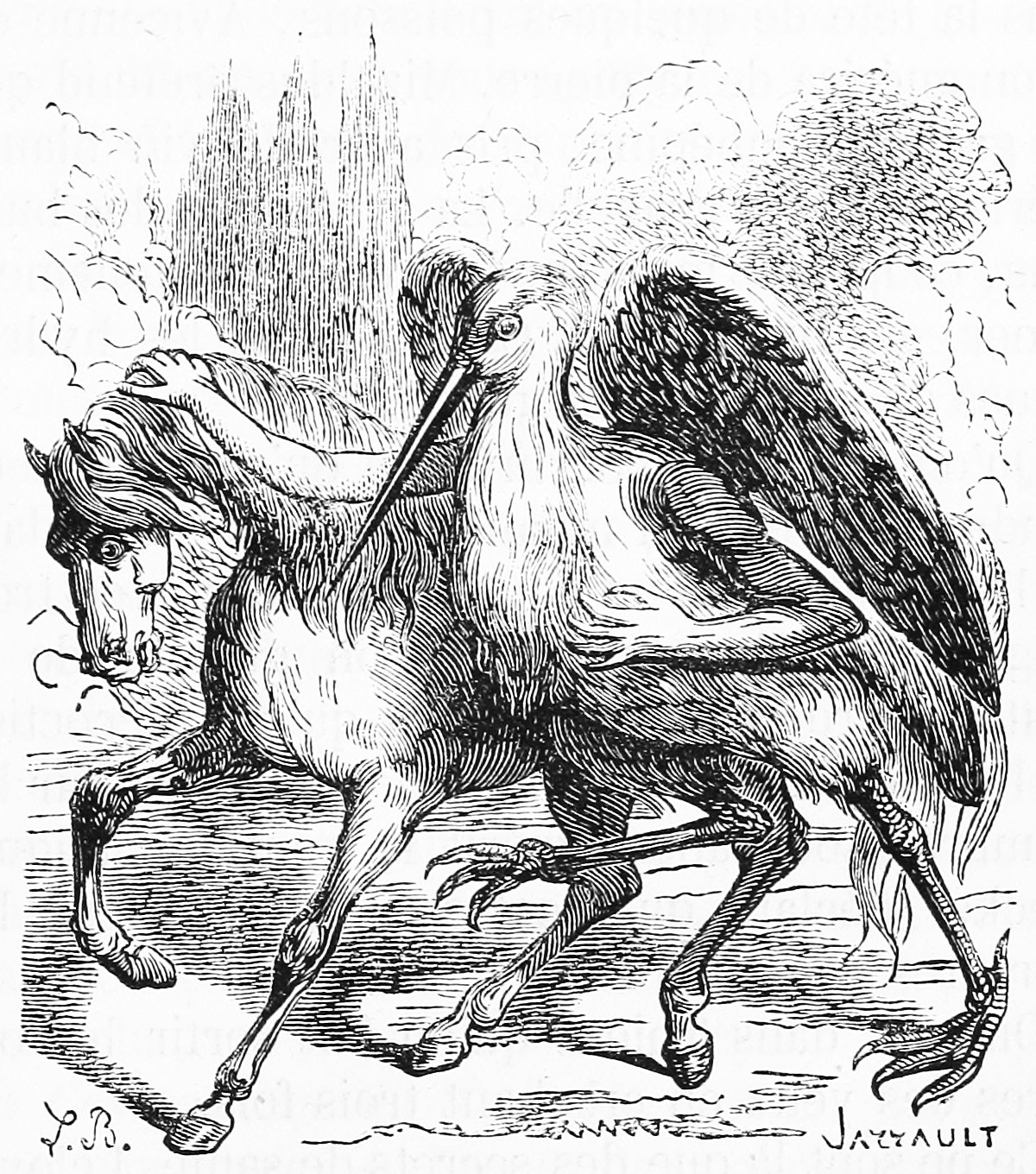 Shax. Illustration du Dictionnaire infernal de Jacques Auguste Simon Collin de Plancy par Louis Le Breton, 6eme édition, 1863.